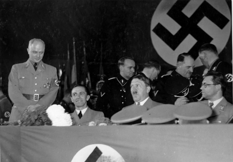 Feiern zum 10-jährigen Bestehen des Gaues Berlin 10 Jahre Gau Berlin Die Feierlichkeiten zum 10jährigen Bestehen des Gaues Berlin erreichten mit der Kundgebung im Sportpalast am Freitagabend [30.10.36] ihren Höhepunkt. Von brausendem Jubel immer wieder unterbrochen, schilderte Dr. Goebbels, der Eroberer Berlins rückblickend noch einmal den Kampf um die Reichshauptstadt. Grossen Jubel löste die überraschende Ankunft des Führers aus, der zu der Alten Garde sprach. Eine Gruppe während der Sportpalast-Kundgebung von links nach rechts: Der stellvertretende Gauleiter Staatsrat Görlitzer, Dr. Goebbels, der Führer, Reichsleiter Bouhler, zwischen ihnen der Kommandeur der Leibstandarte Adolf Hitler, Sepp Dietrich. Scherl Bilderdienst, Berlin 31.10.1936 15484-36 Abgebildete Personen: Görlitzer, Artur: Stellvertretender Gauleiter von Berlin, Staatsrat, MdR, Deutschland (GND 128025263) Goebbels, Joseph: Reichsminister für Volksaufklärung und Propaganda, Gauleiter Berlin, Deutschland Hitler, Adolf: Reichskanzler, Deutschland Dietrich, Joseph (Sepp): Generaloberst, Ritterkreuz (RK), SS-Oberst-Gruppenführer, Leibstandarte, Deutschland (GND 11888932X)